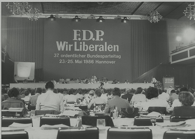 37. ordentlicher FDP Bundesparteitag 23.-25. Mai 1986 in Hannover